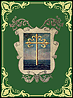 Escudo Encuentro de Coros Almas Jovenes